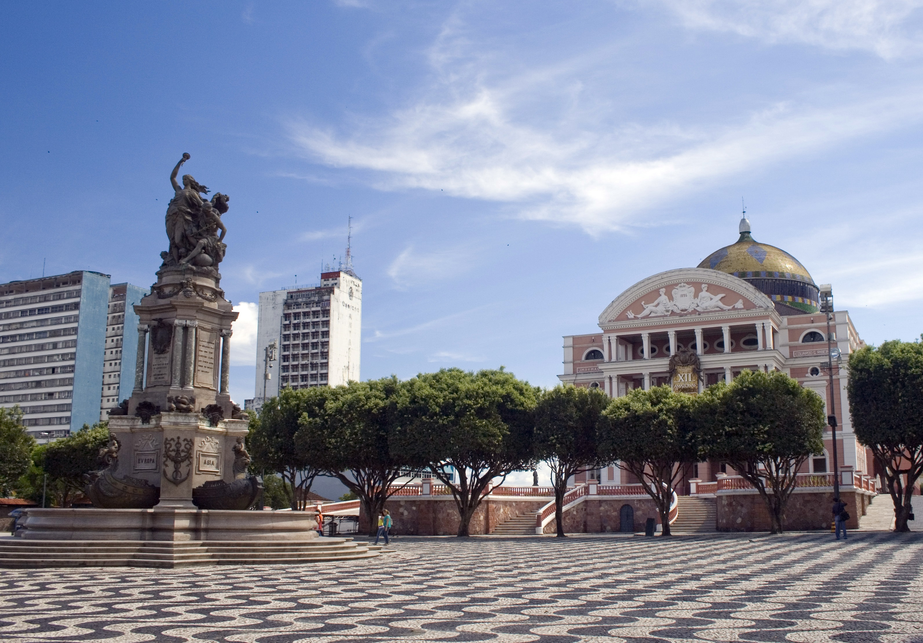 Teatro Amazonas, Manaus, Brasil.